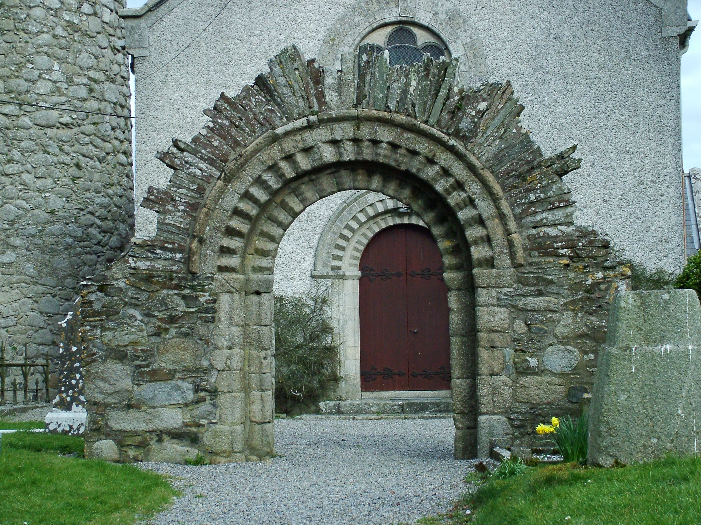 Castledermoti temető (Írország)